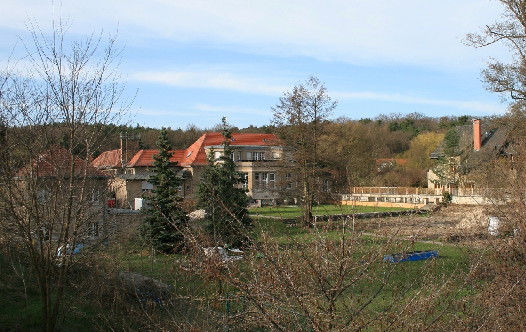 Land Brandenburg; Landkreis Potsdam. Neu Fahrland, Am Lehnitzsee 1. Baudenkmal: Villa Adlon